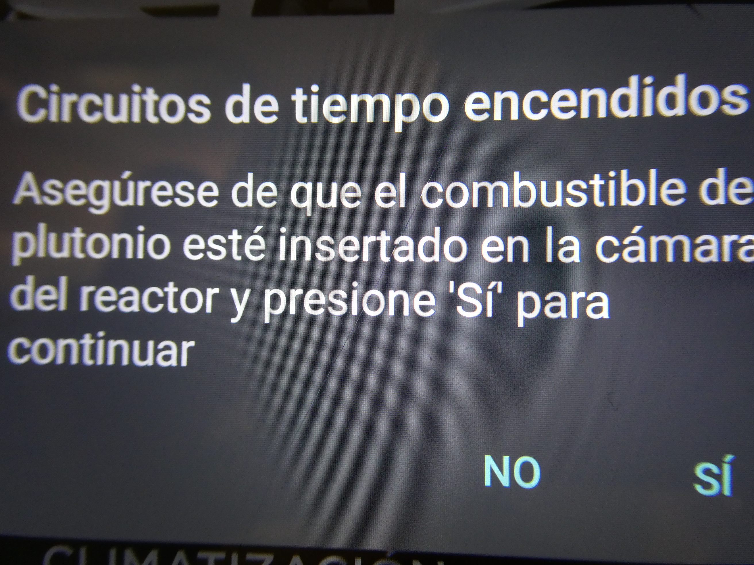 Cuadro de entrada del huevo de Pascua Outatime en la app Tesla.